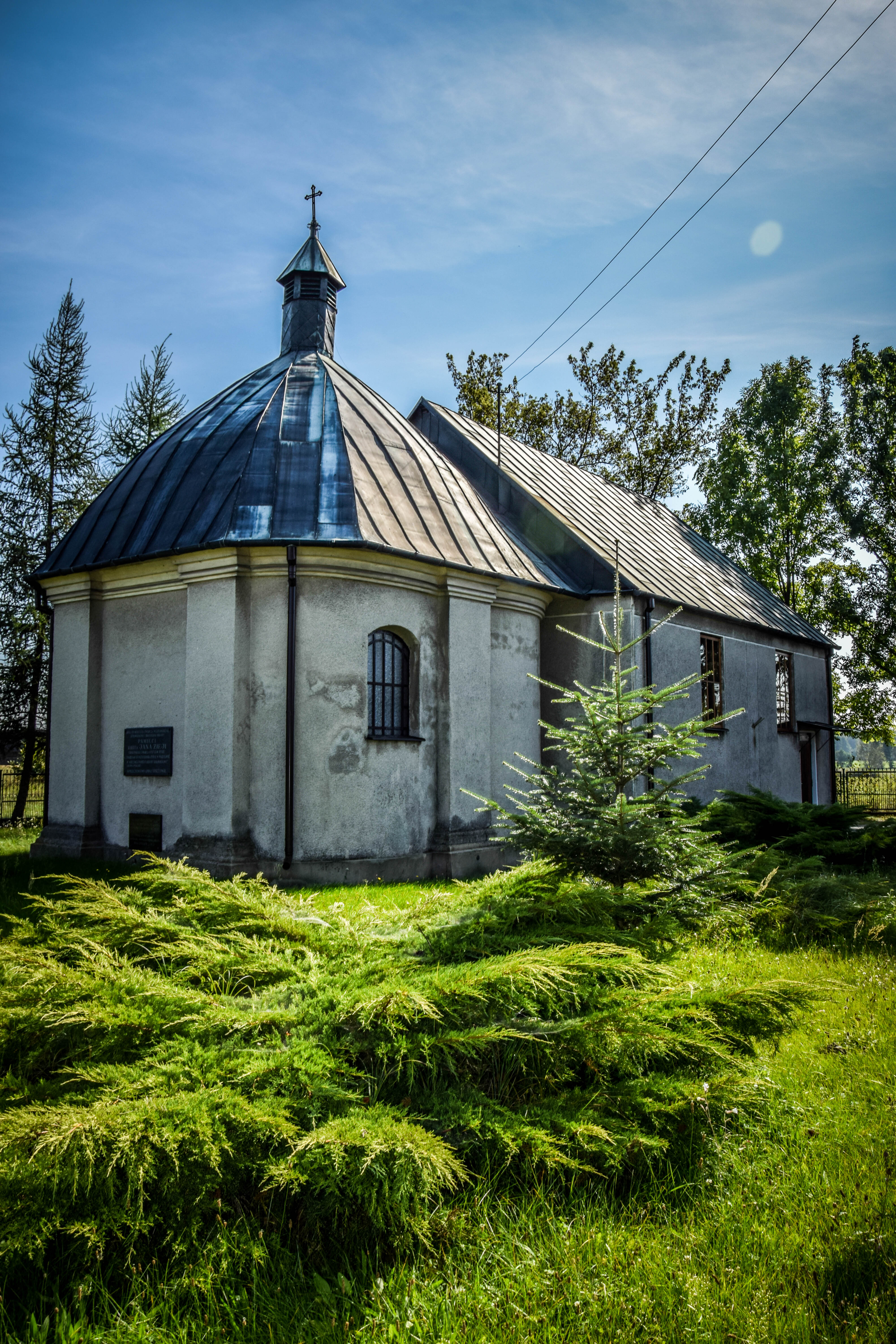 Ossa, kaplica dworska pw. św. Teresy, XVIII